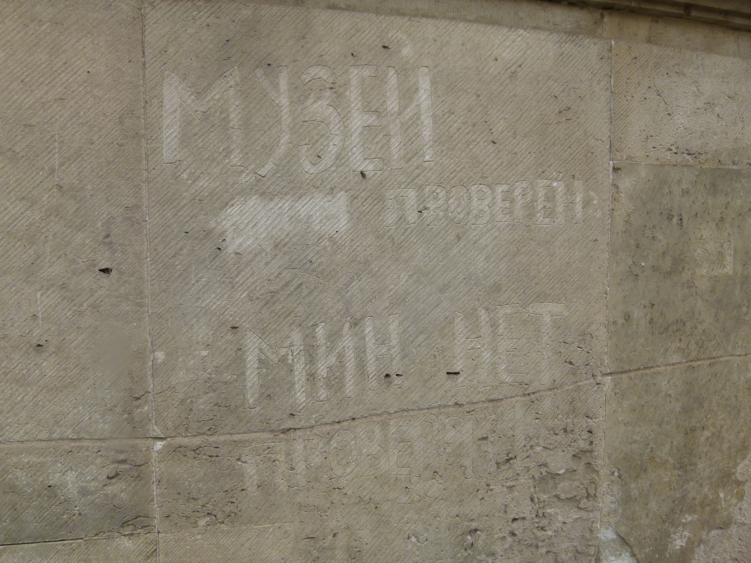 Russische Schrift am Glockenspielpavillon an der Sophienstraße in Dresden: „Museum überprüft. Keine Minen. Es prüfte Chanutin.“ von 1945